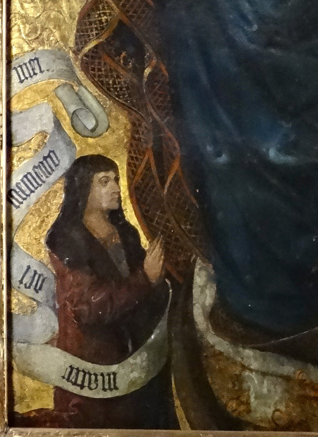 Obraz Matki Bożej Pięknej Miłości w ołtarzu głównym katedry bydgoskiej; "Madonna Bydgoska" (XV w.), dwukrotnie koronowany (1966, 1999)